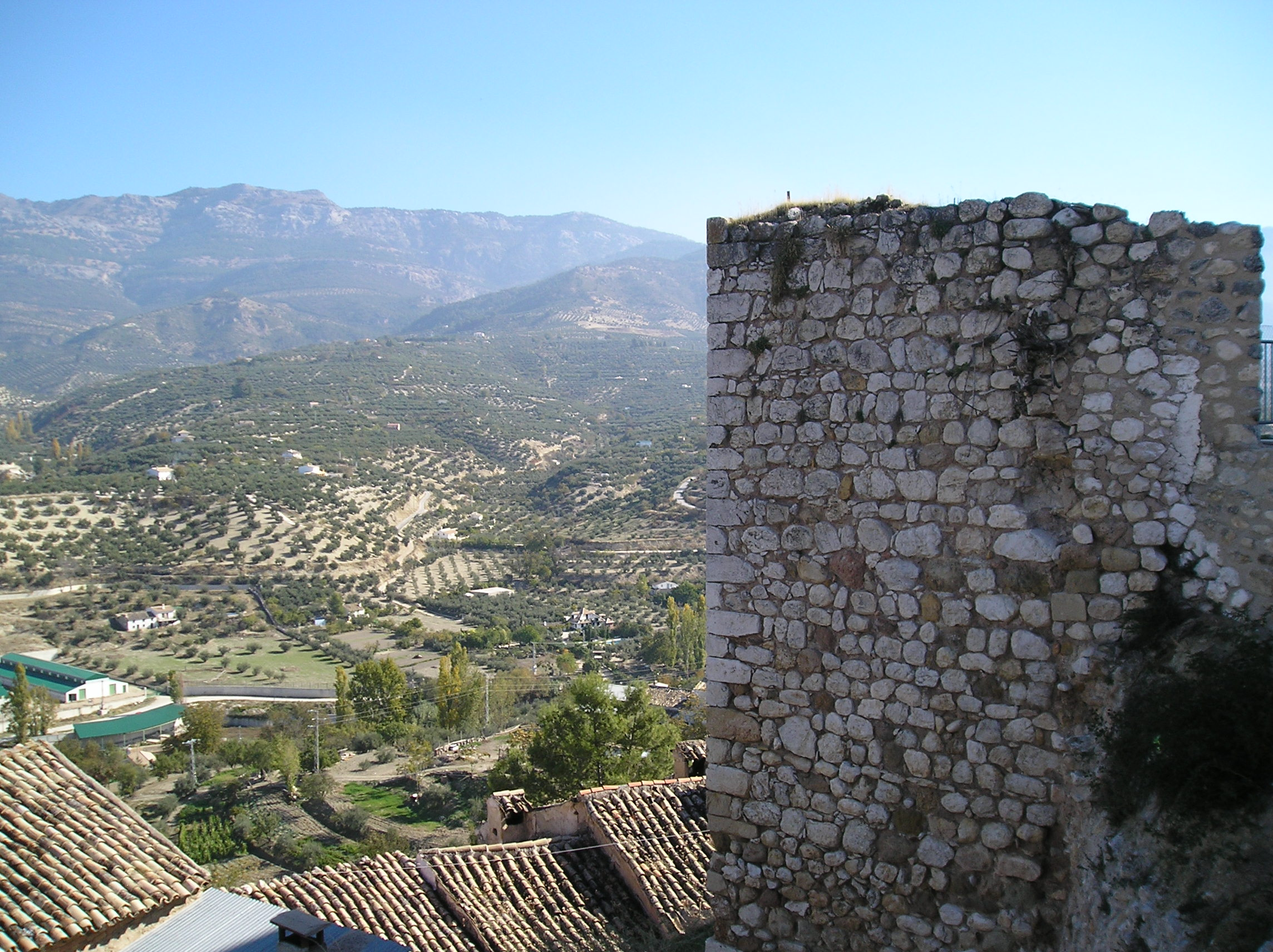 Panorámica desde la Muralla de Quesada